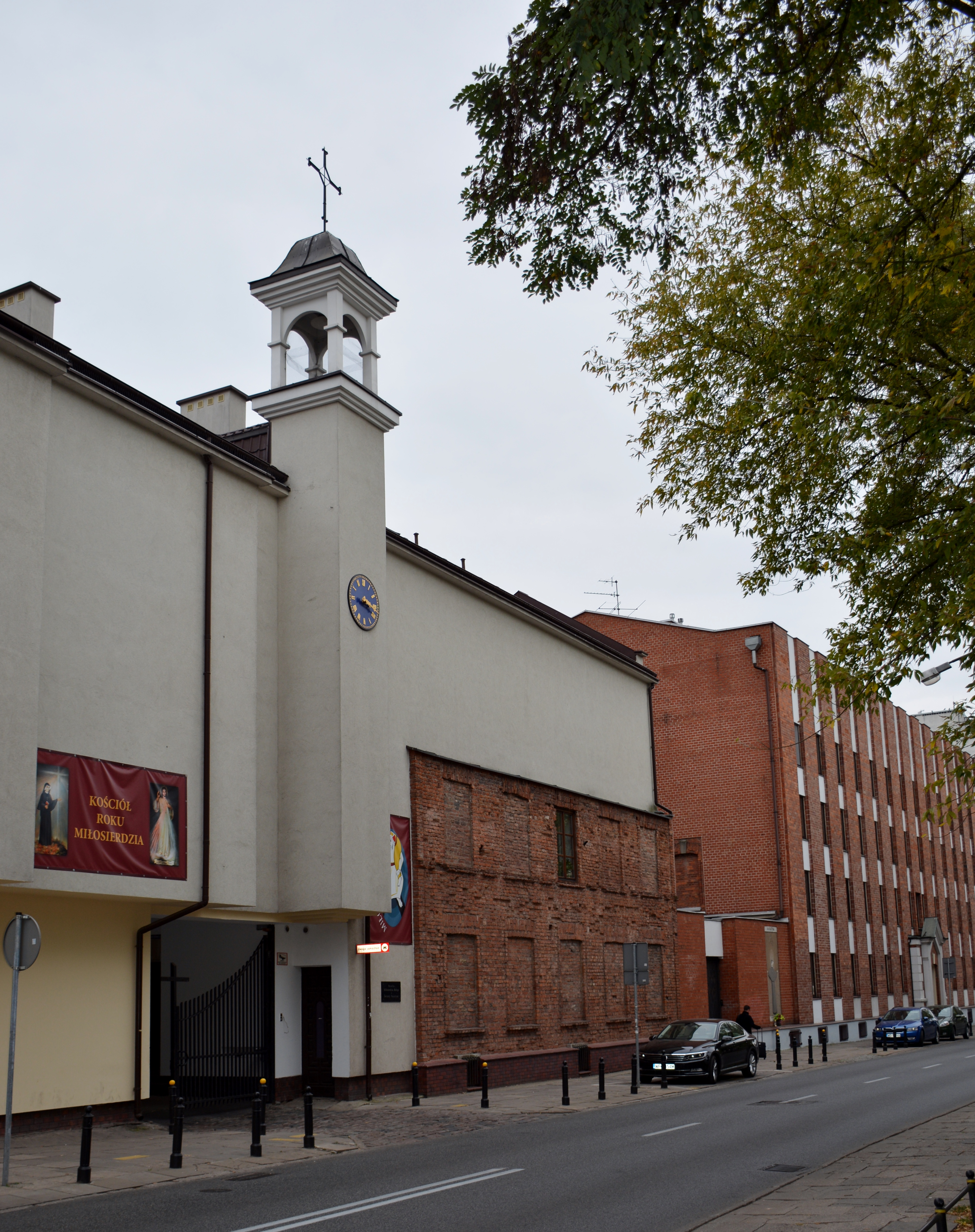 Młynów, Warszawa, Poland